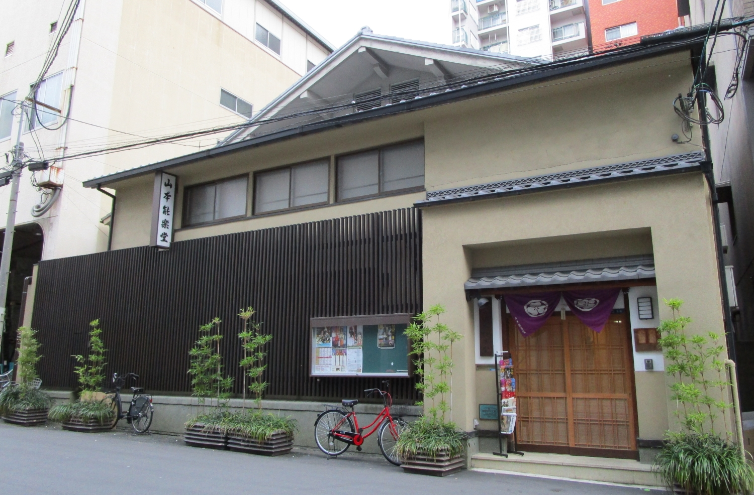 山本能楽堂